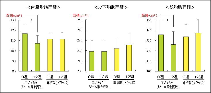 堀祐輔ほか 「エノキタケ抽出物含有食品の連続摂取による内臓脂肪減少効果の検証」『応用薬理』76(1/2)号、2008年、19頁 にある図をもとに作成。